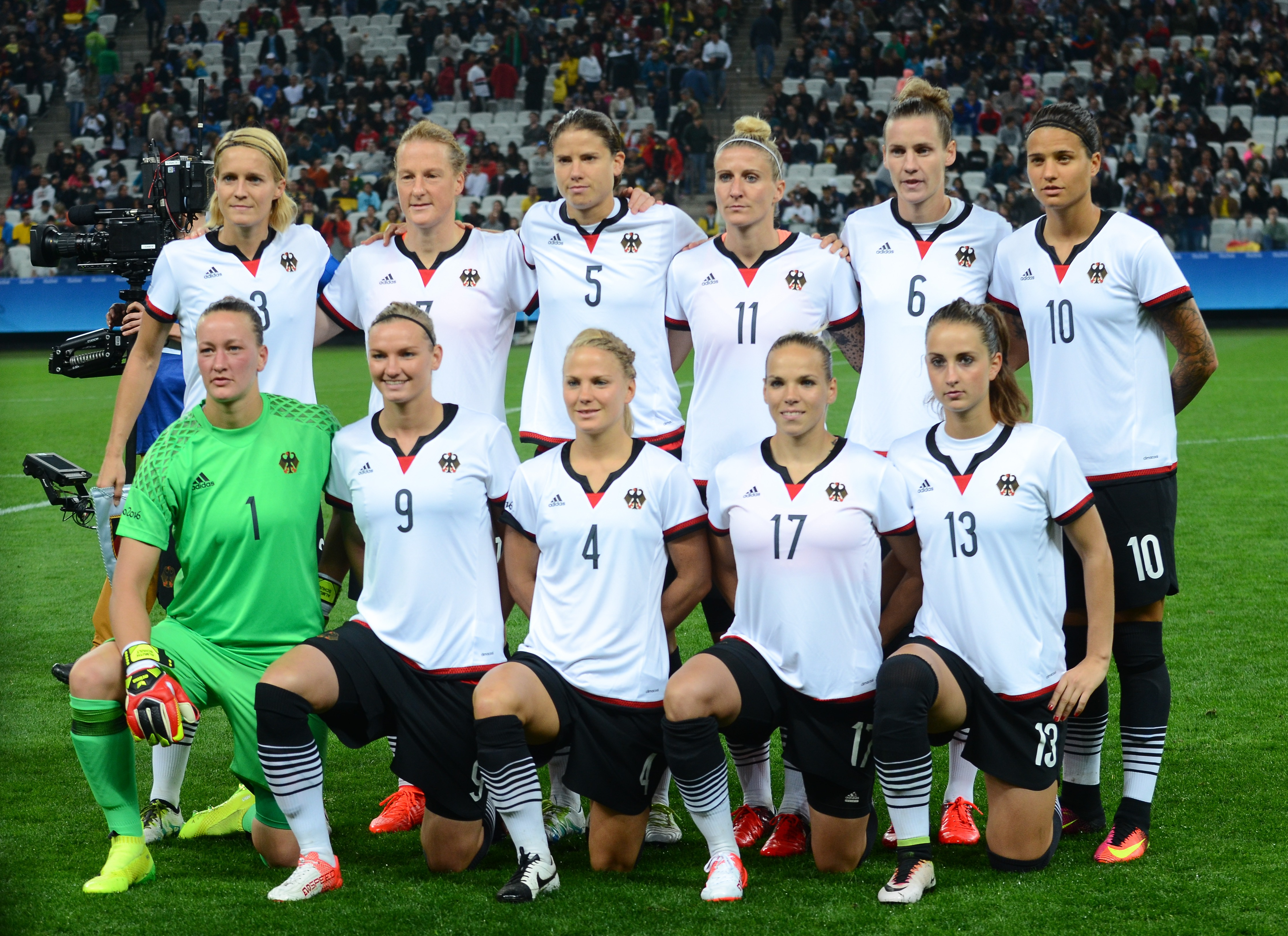 São Paulo - Seleções femininas do Zimbábue e da Alemanha se enfrentam na Arena Corinthians (Rovena Rosa/Agência Brasil)